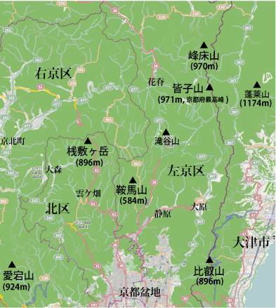 京都北山とその周辺の山々の位置図